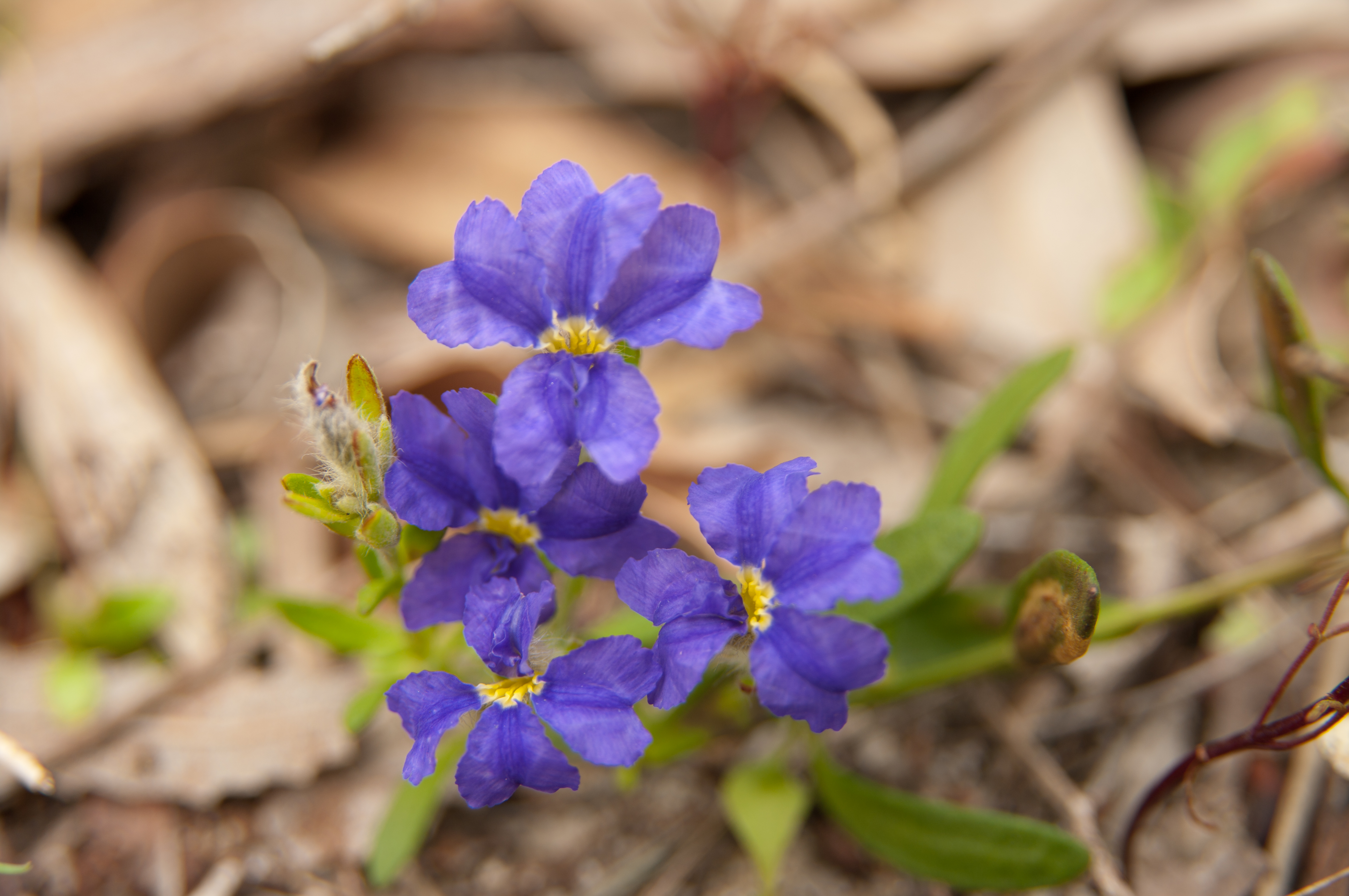 Dampiera triloba Beeliar Wetlands Murdoch